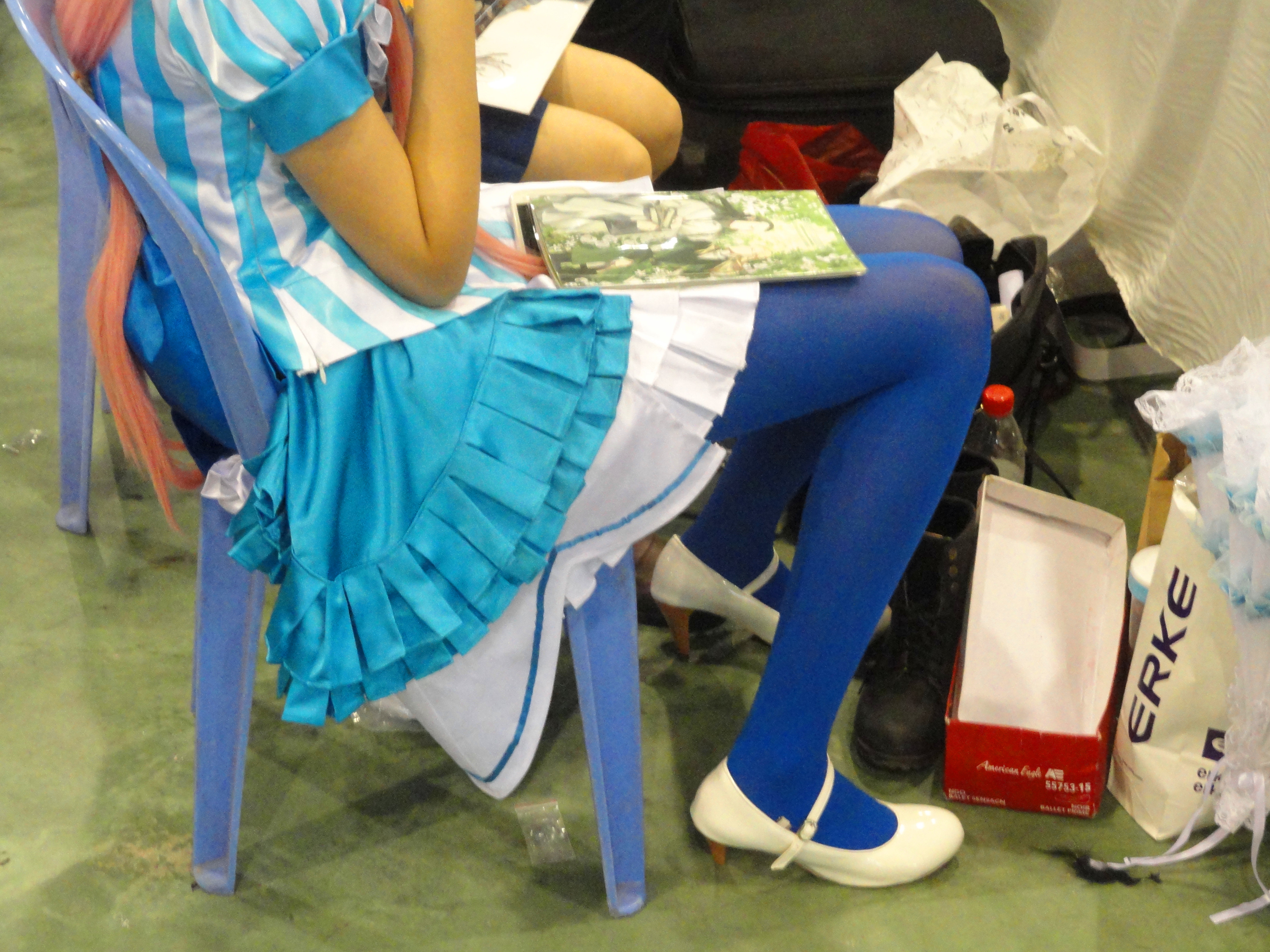 中文（中国大陆）: 第八届AMOE同人展上拍摄的穿着蓝色连裤袜的Coser